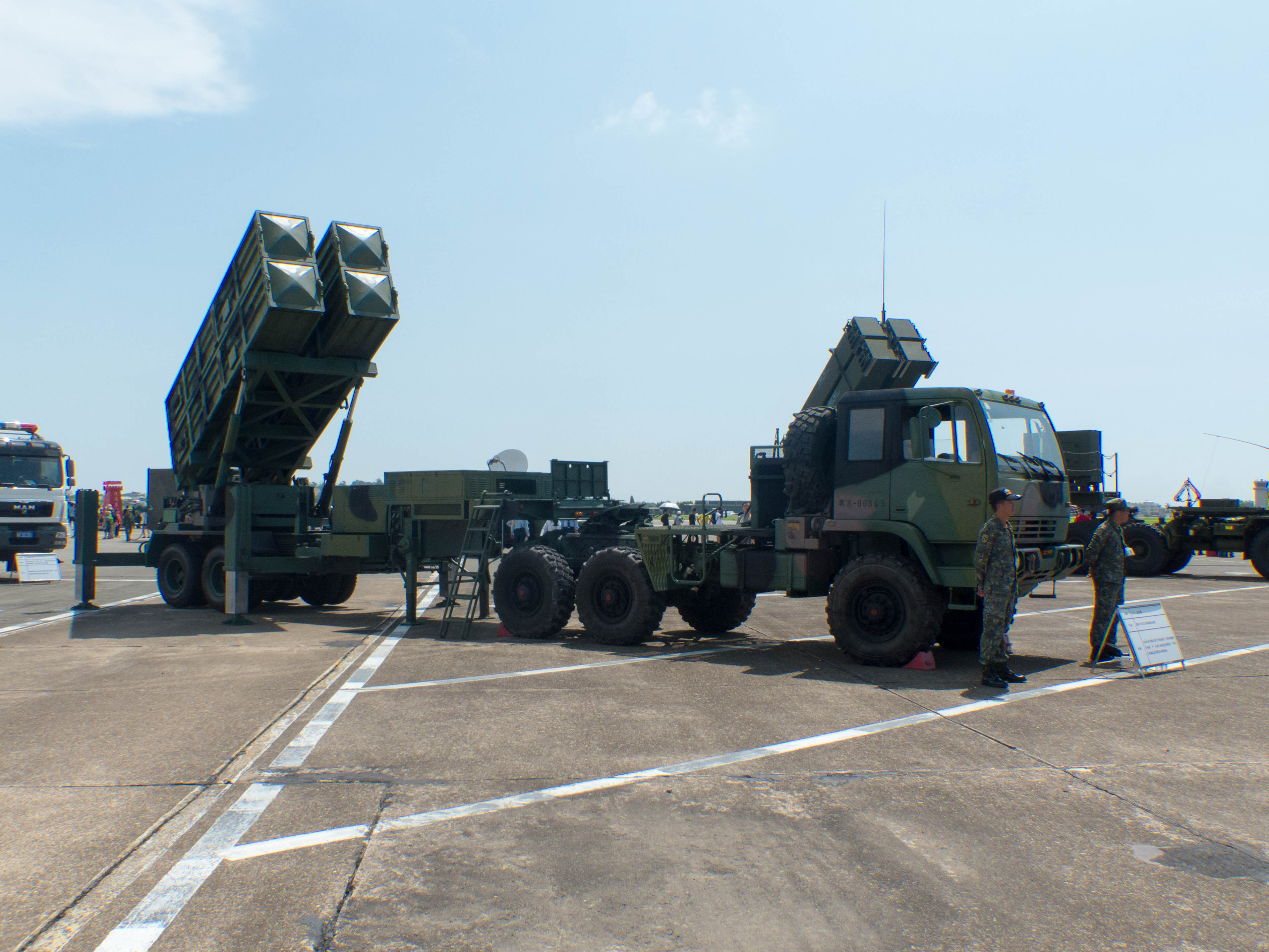 2017年空軍官校營區開放活動，停機坪靜態展示的陸軍天弓二型防空飛彈發射車與曳引重型卡車。